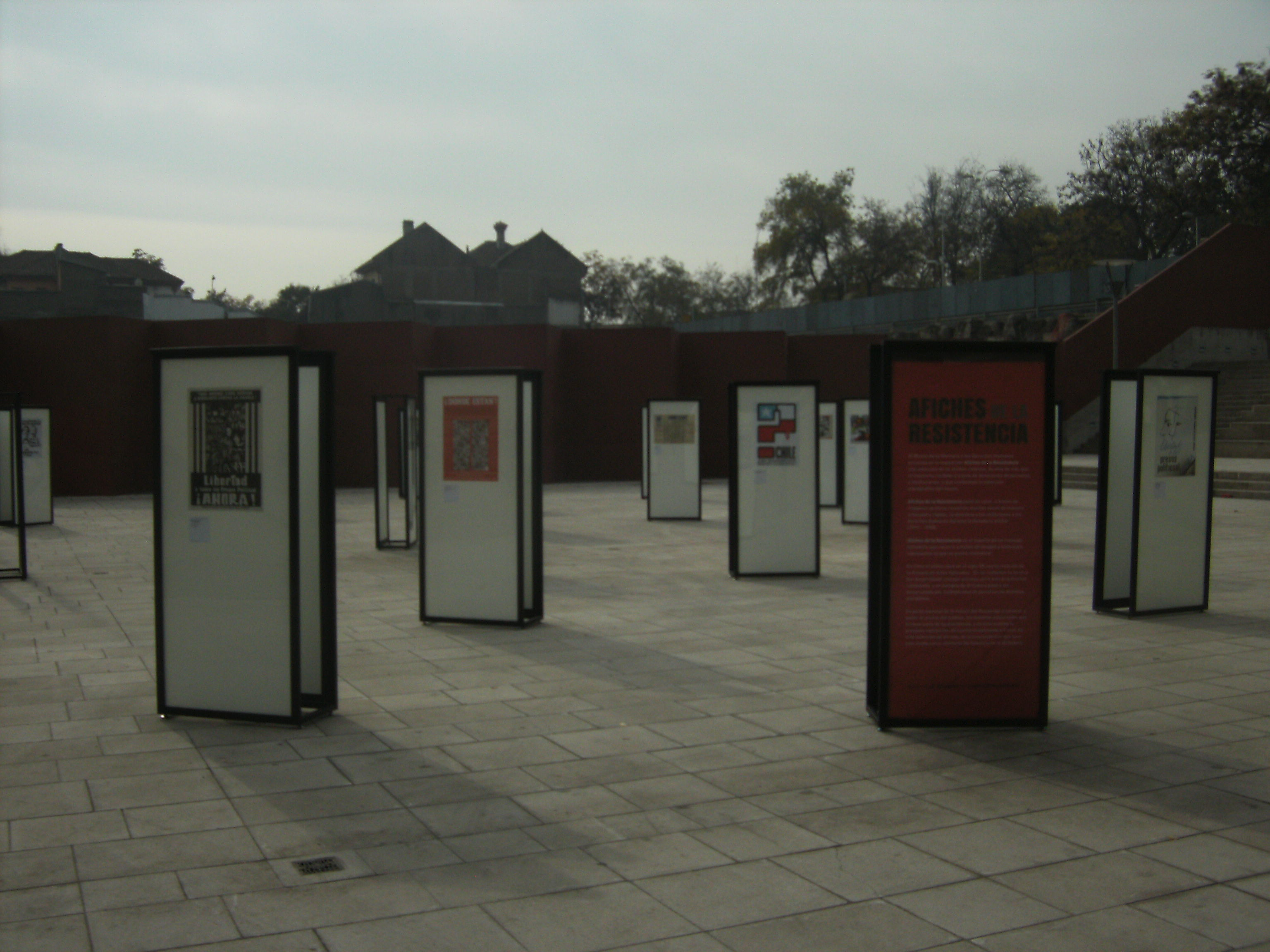 Plaza externa del Museo de la Memoria, lugar para realizar conciertos, películas y exposiciones transitorias.